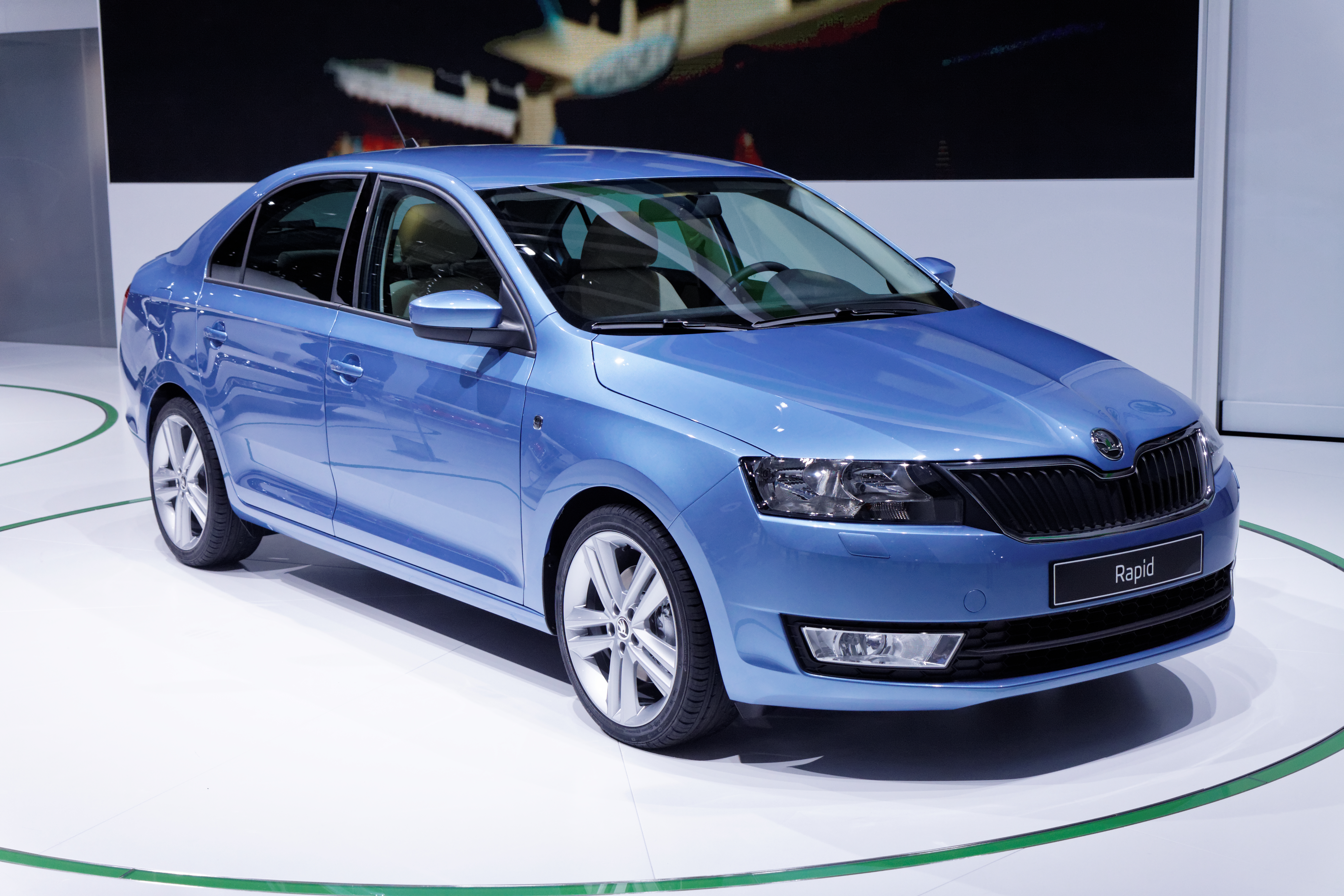 Une Škoda Rapid présentée lors du Mondial de l'Automobile de Paris 2012.